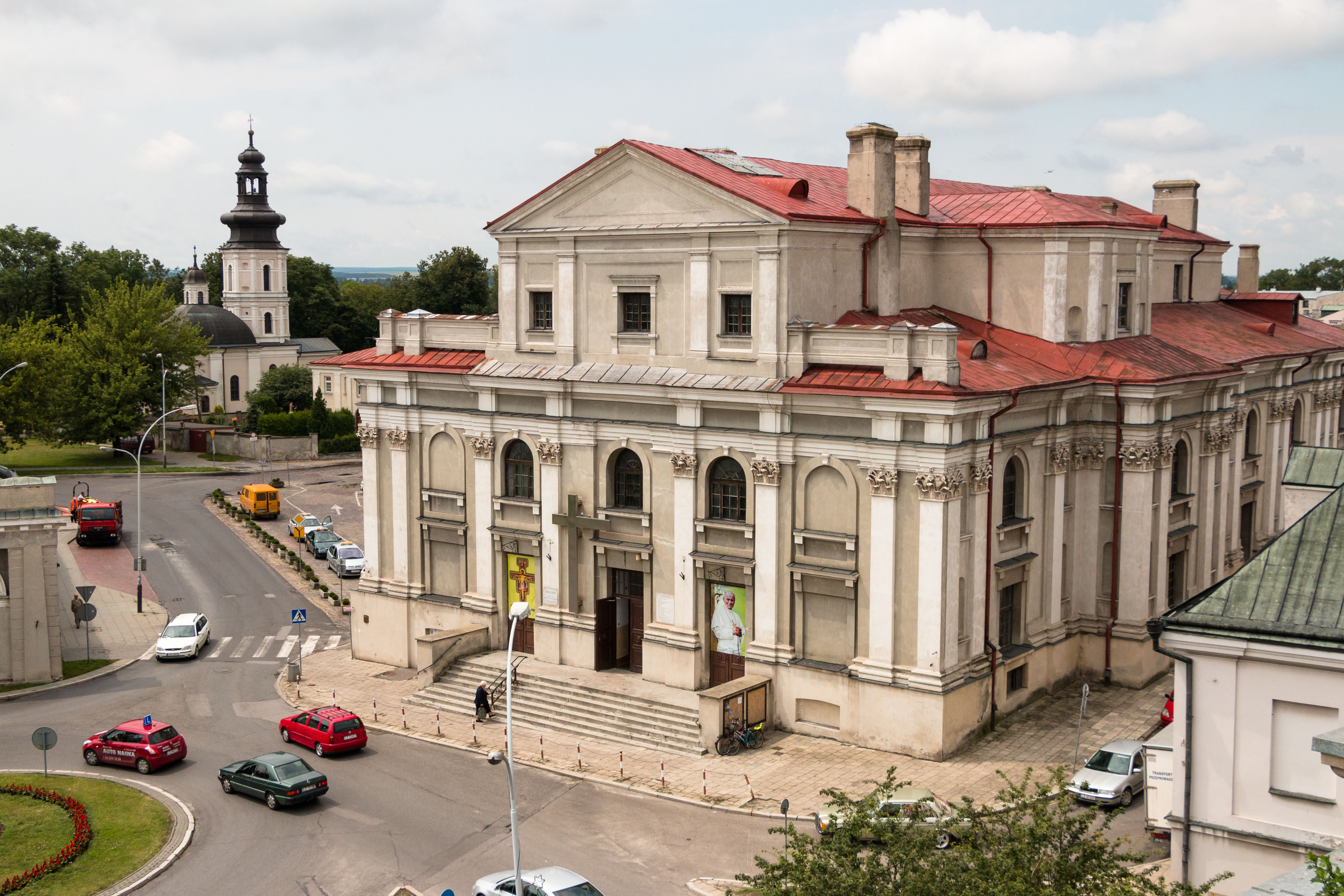 Zamość, Kościół franciszkanów pw. Zwiastowania NMP (1637 r., 1809 r., XIX/XX w.)